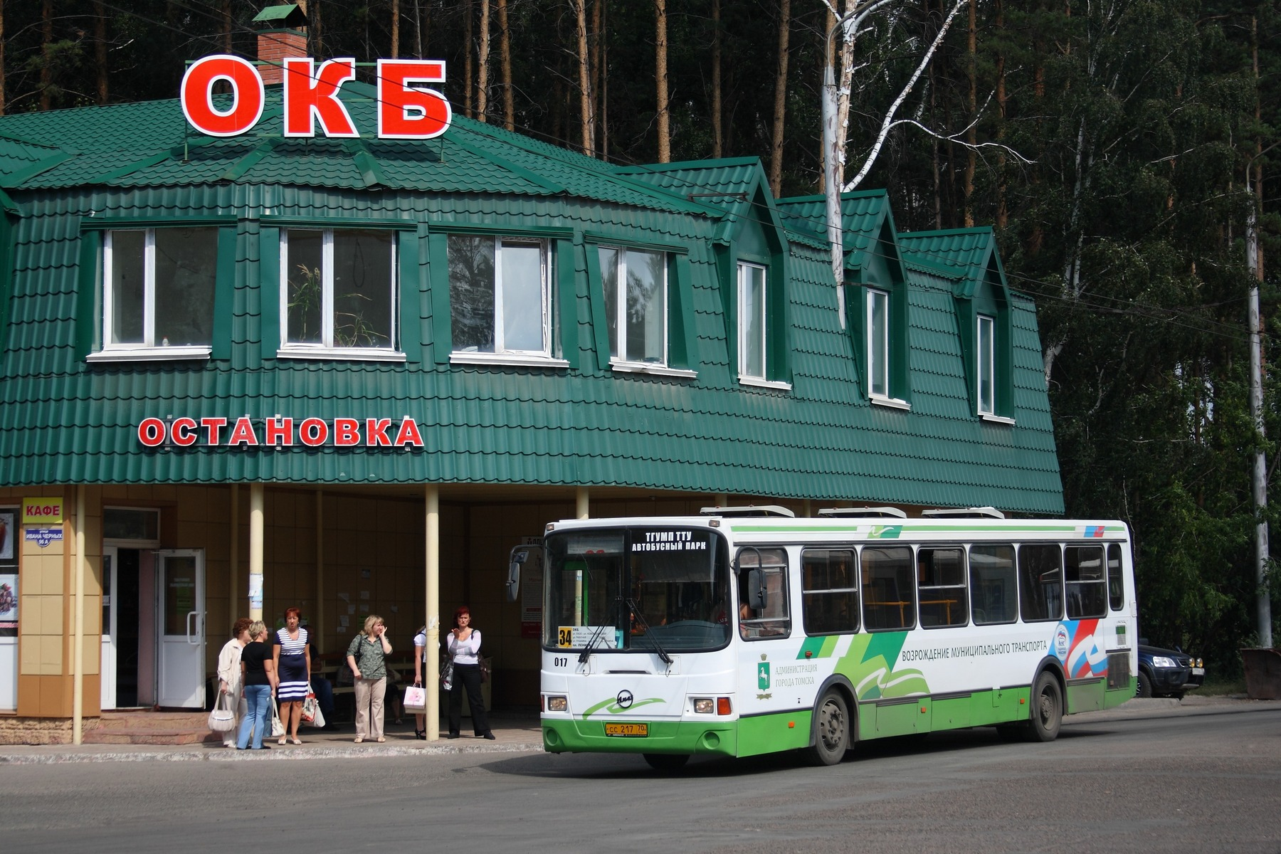 Остановка ОКБ